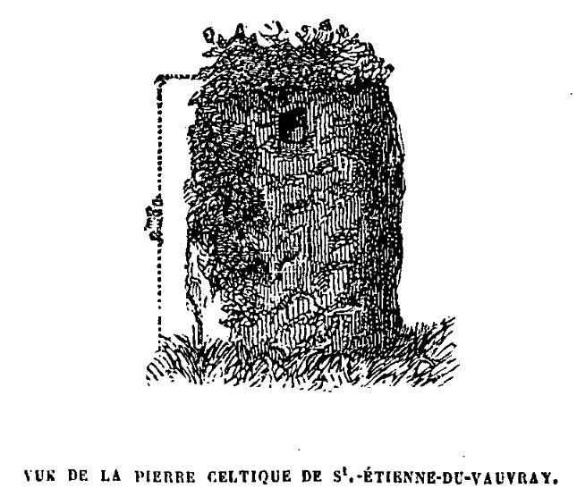 Menhir de la Basse Crémonville dessiné en 1842 par Théodose Bonnin